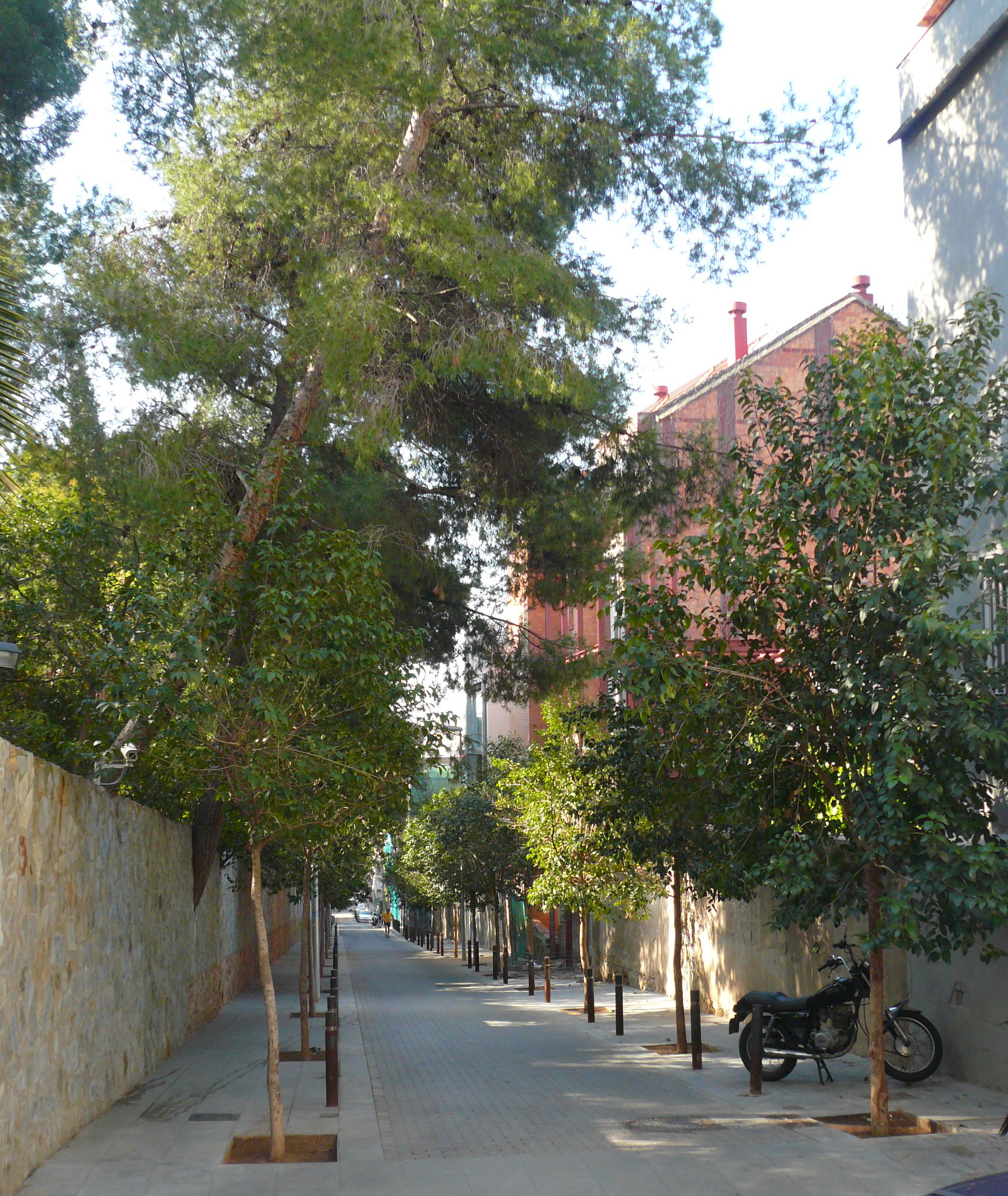 Carrer de Musitu, barri del Putget, Sant Gervasi, Barcelona